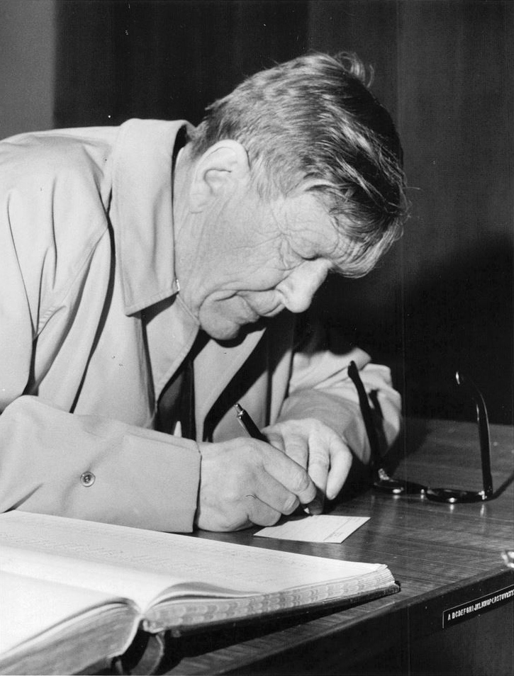 För att förbereda en översättning av Dag Hammarskjölds bok "Vägmärken" har den brittiske författaren W. H. Auden kommit till Stockholm. Auden och Hammarskjöld var personliga vänner och svensken hade själv uttryckt om att få Auden som översättare för en anglosaxisk upplaga. Den över västvärlden så berömde poeten är underligt okänd i Sverige men att han bör vara en kongenial tolkare av Hammarskjöld framgår bland annat av att han har innehaft lärostolen i i poetik i Oxford. Bilden: W. H. Auden skriver in sig på Grand Hôtel.